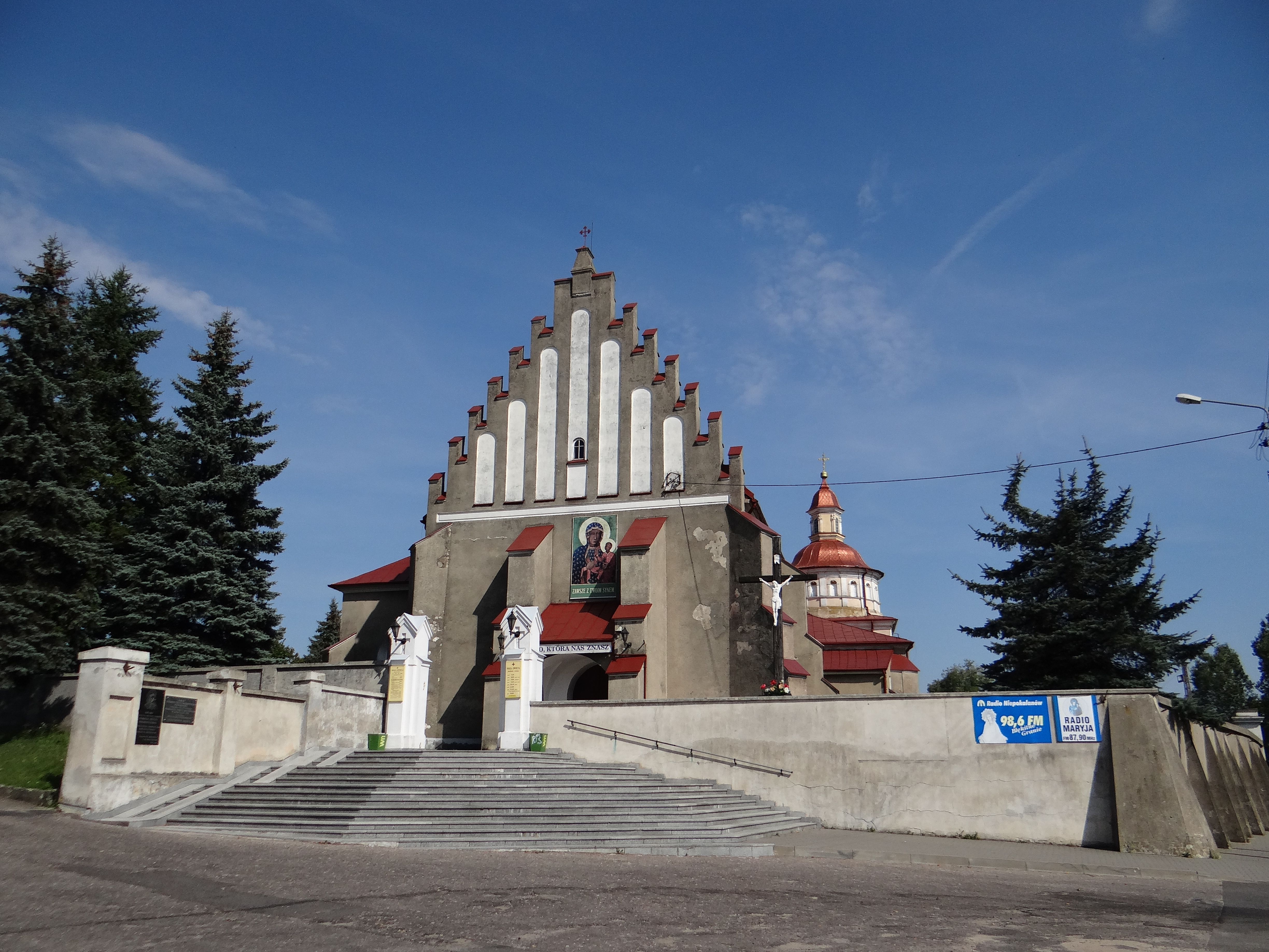 Kościół p.w. Podwyższenia Świętego Krzyża w Brzezinach - wejście główne